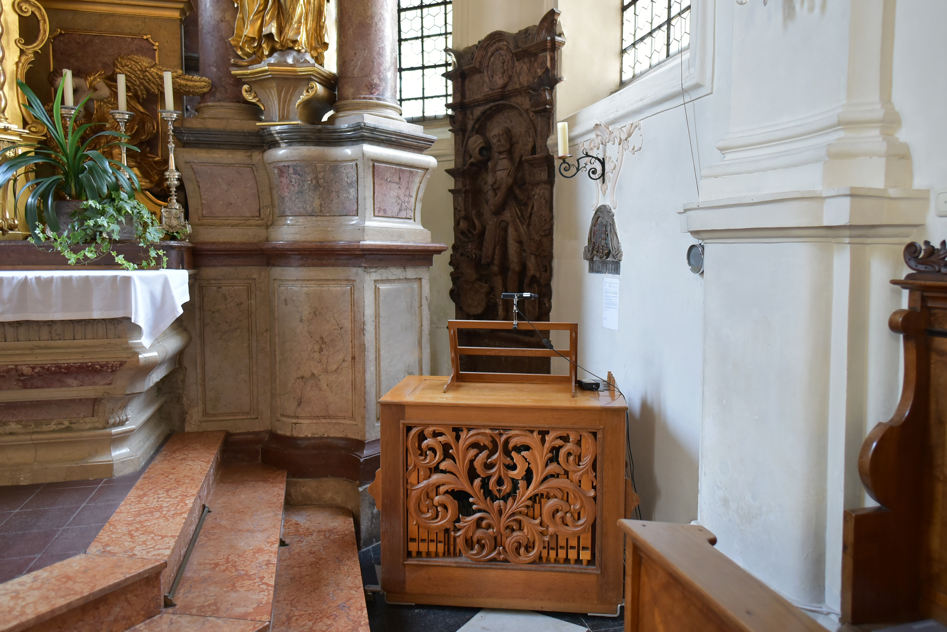 Portables Truhenpostitiv der Firma Georg Jann (1983) mit 5 Registern, hier dargestellt im Presbyterium der Pfarrkirche Mariä Himmelfahrt Prien.